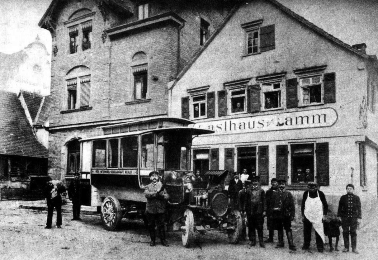 Heilbronn-Böckingen, Stedinger Straße (früher Heilbronner Straße) 4, Gasthaus zum Lamm, linke Hälfte errichtet 1897 nach Plänen von August Mogler, rechte Hälfte zeigt noch das für den Neubau 1907 abgebrochene alte Fachwerkhaus. Im Hintergrund links, das Gasthaus zur Sonne.